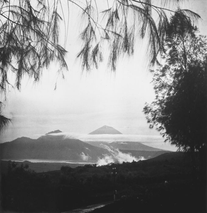 Foto. Gezicht vanuit Kintamani op het Baturmeer en de vulkanen Abang en Agung